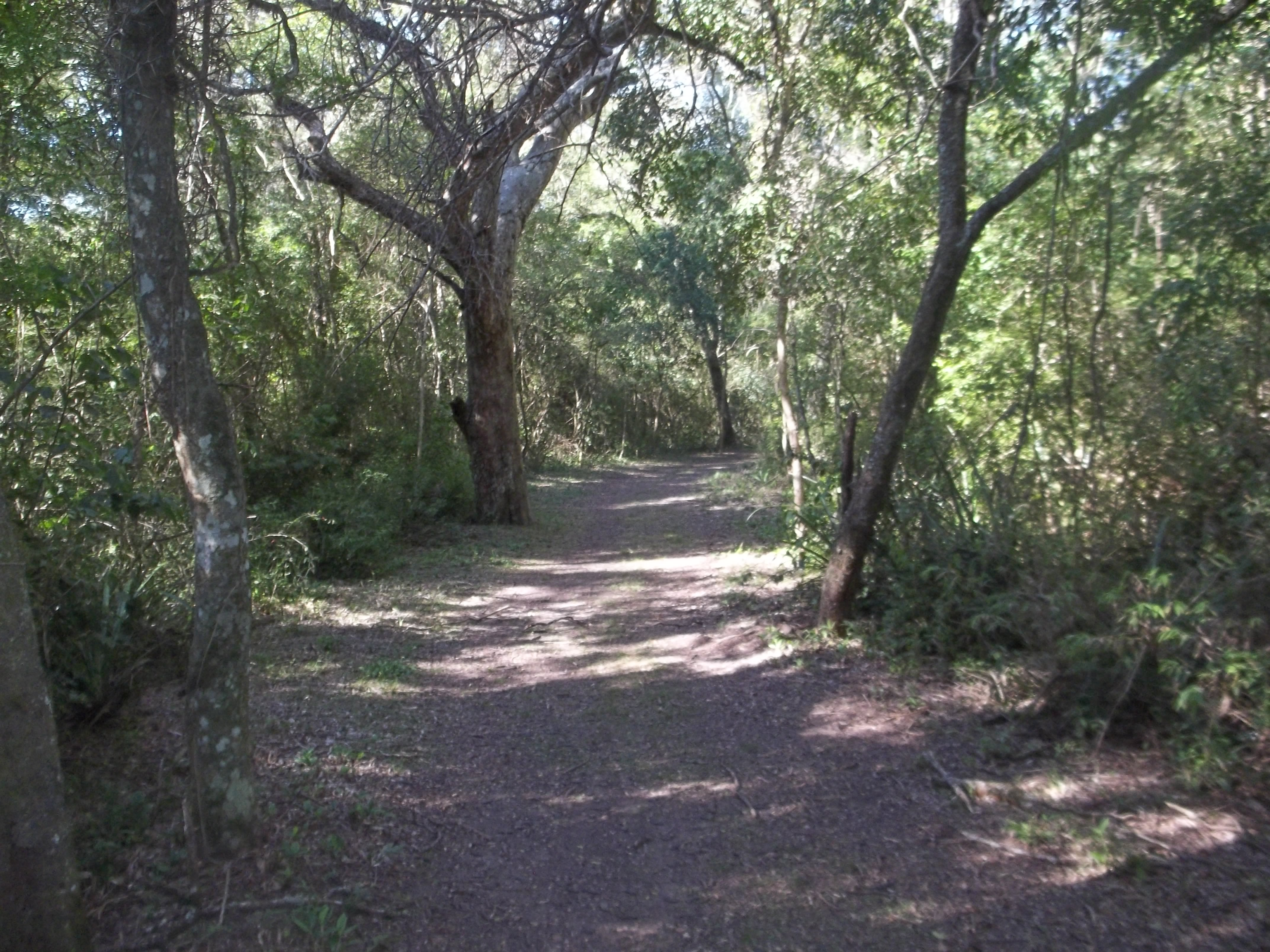 Sendero a la laguna Carpincho en el Parque nacional Chaco, rodeado de la selva del Chaco húmedo.